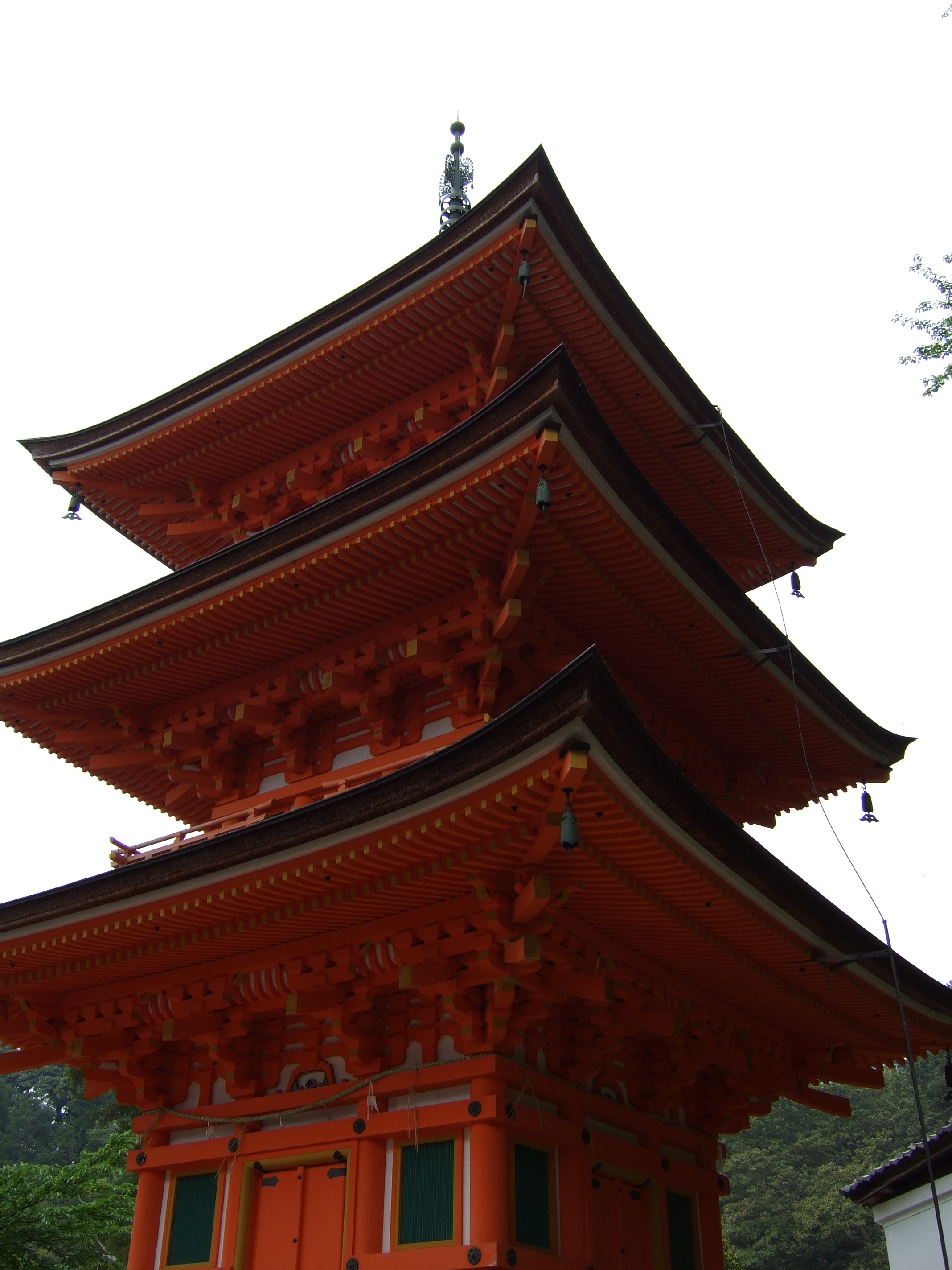 宝厳寺